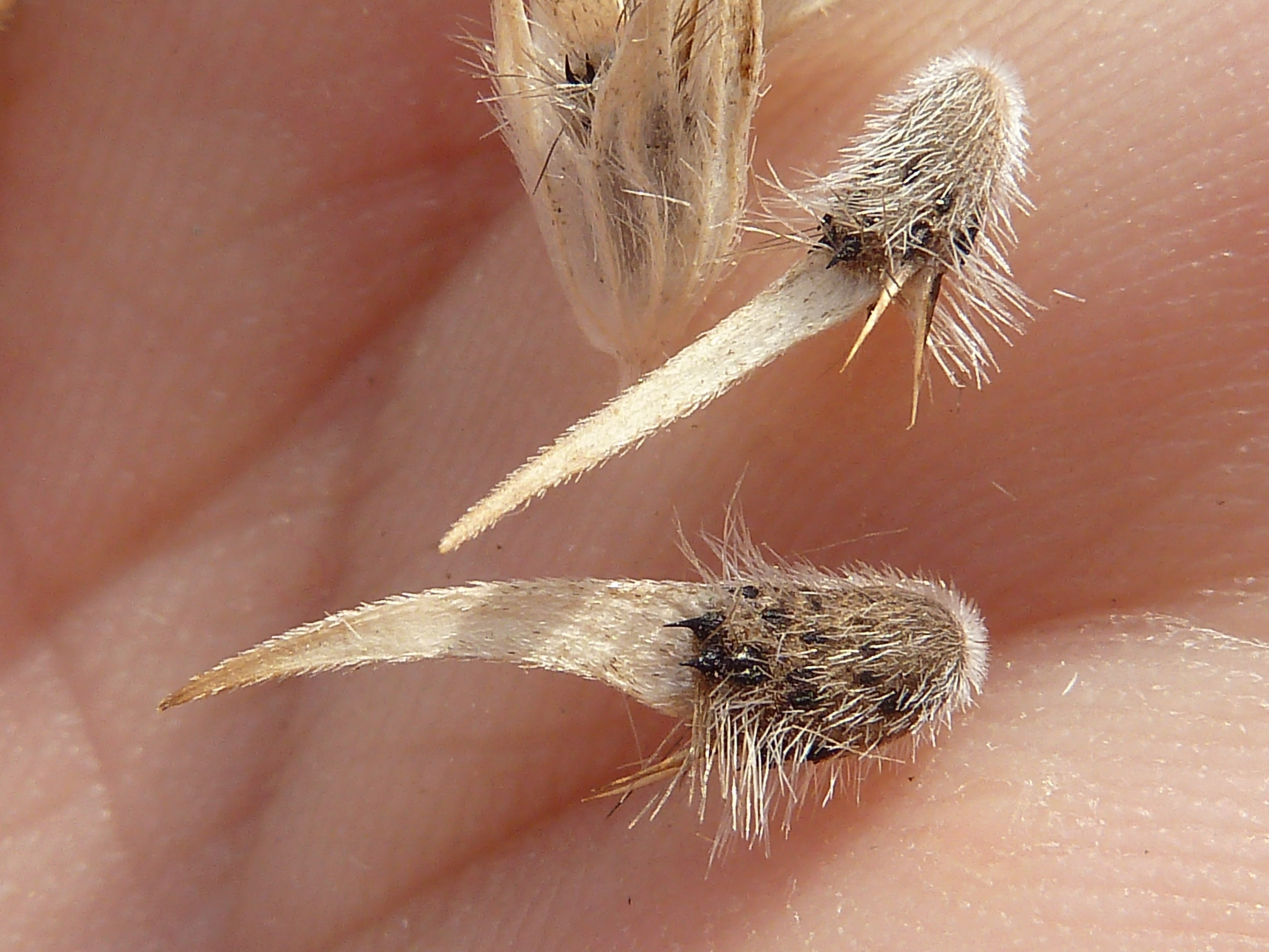 Psoralea bituminosa : Frutos maduros - Circunvalación Norte, Águilas (Murcia, España).